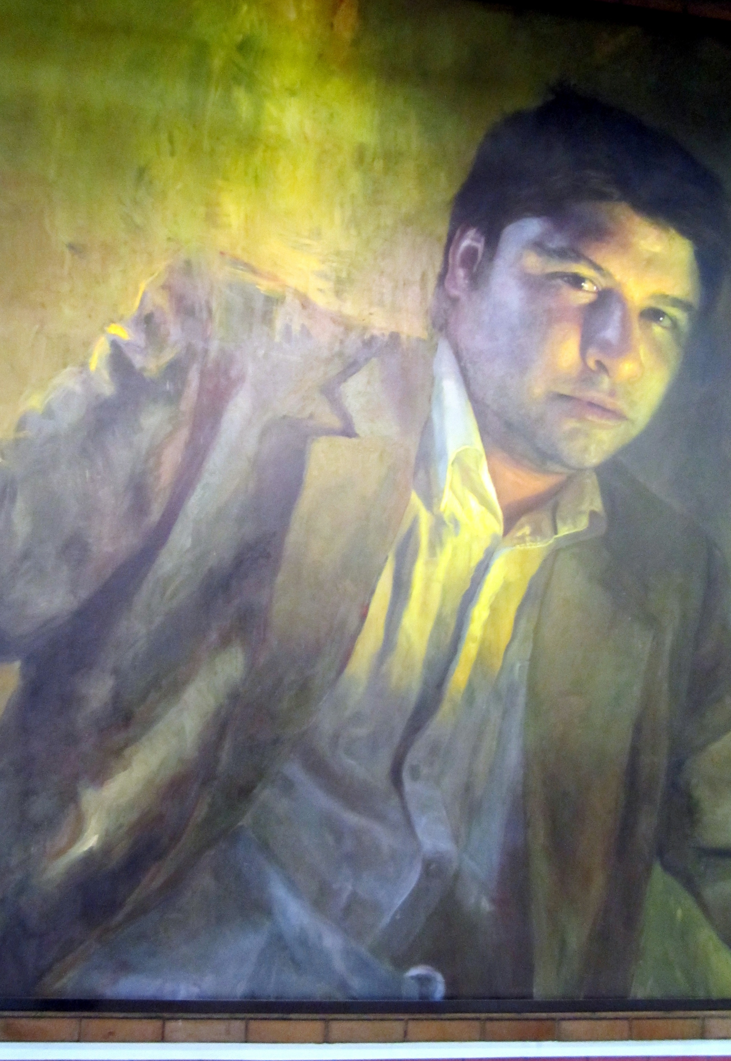 Retratos realizados por el pintor Guillermo Lorca en la estación de metro Baquedano, Santiago de Chile.